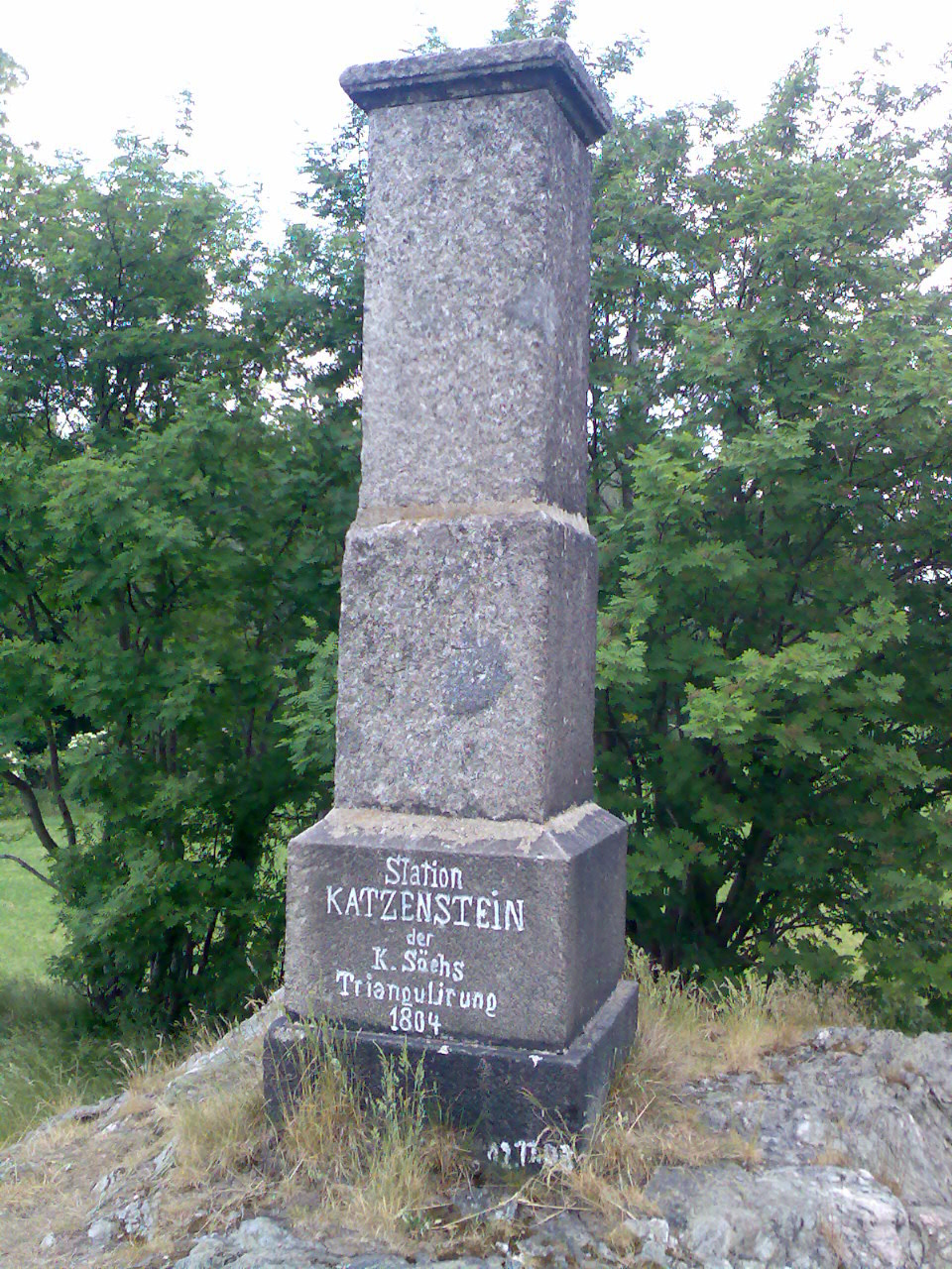 Triangulierungspunkt auf dem Berg Katzenstein im Erzgebirge, Sachsen, Deutschland. Die Jahresangabe auf dem Steinobelisken ist nicht korrekt und sollte 1864 lauten anstatt 1804, siehe Katzenstein (Erzgebirge) Wegweisser.jpg